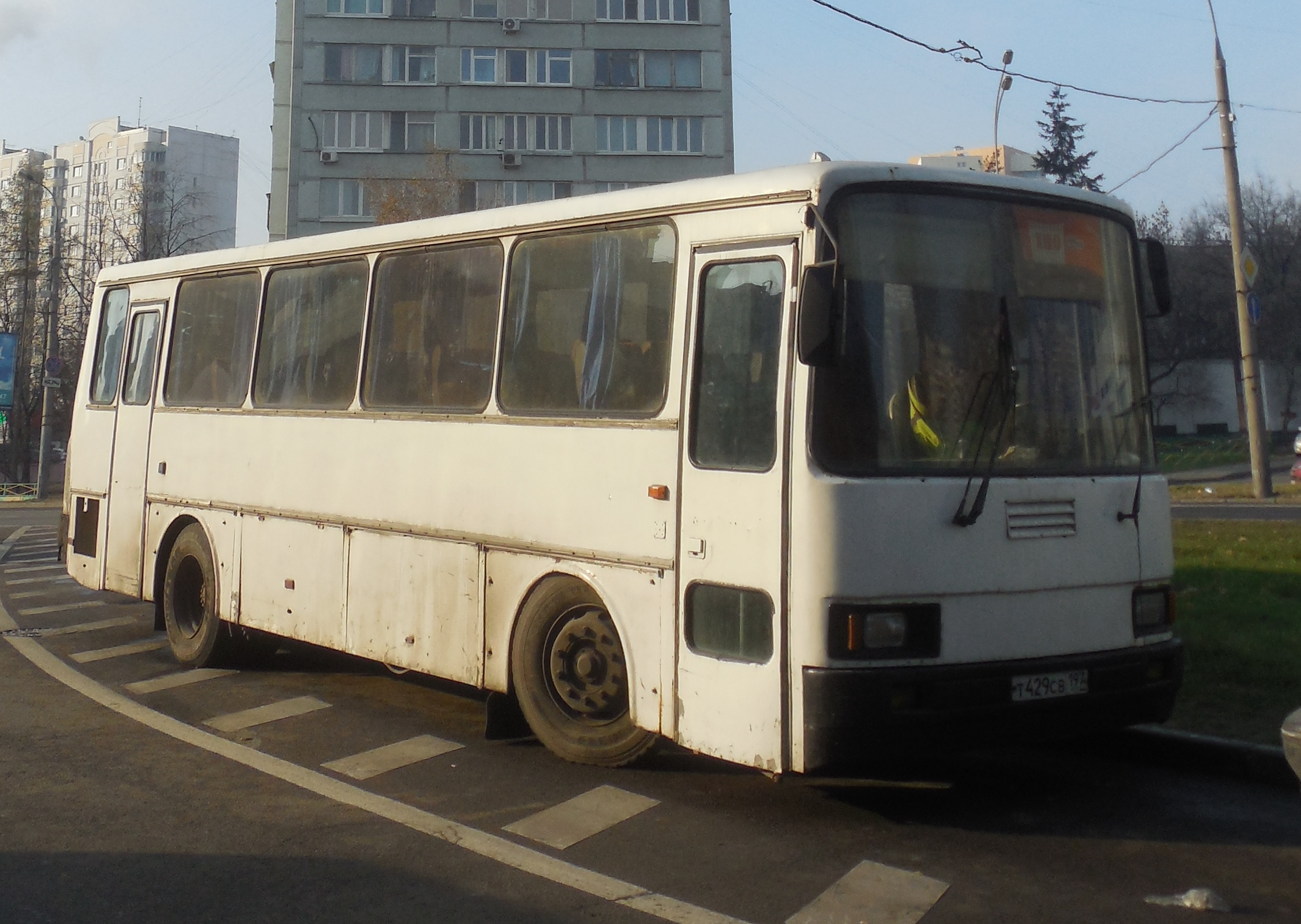 LAZ-4207